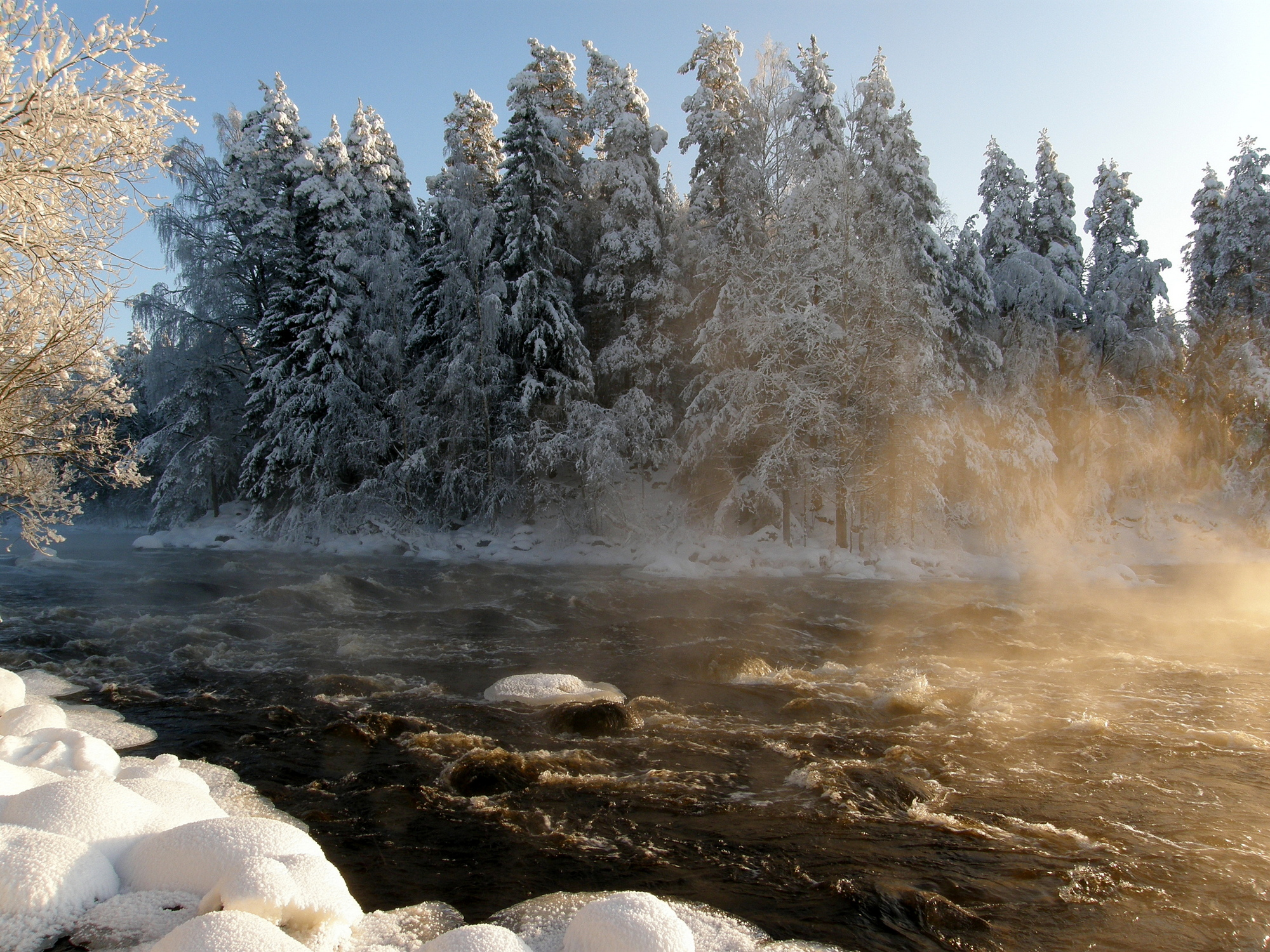 Talvinen Äänekosken Kapeenkoski